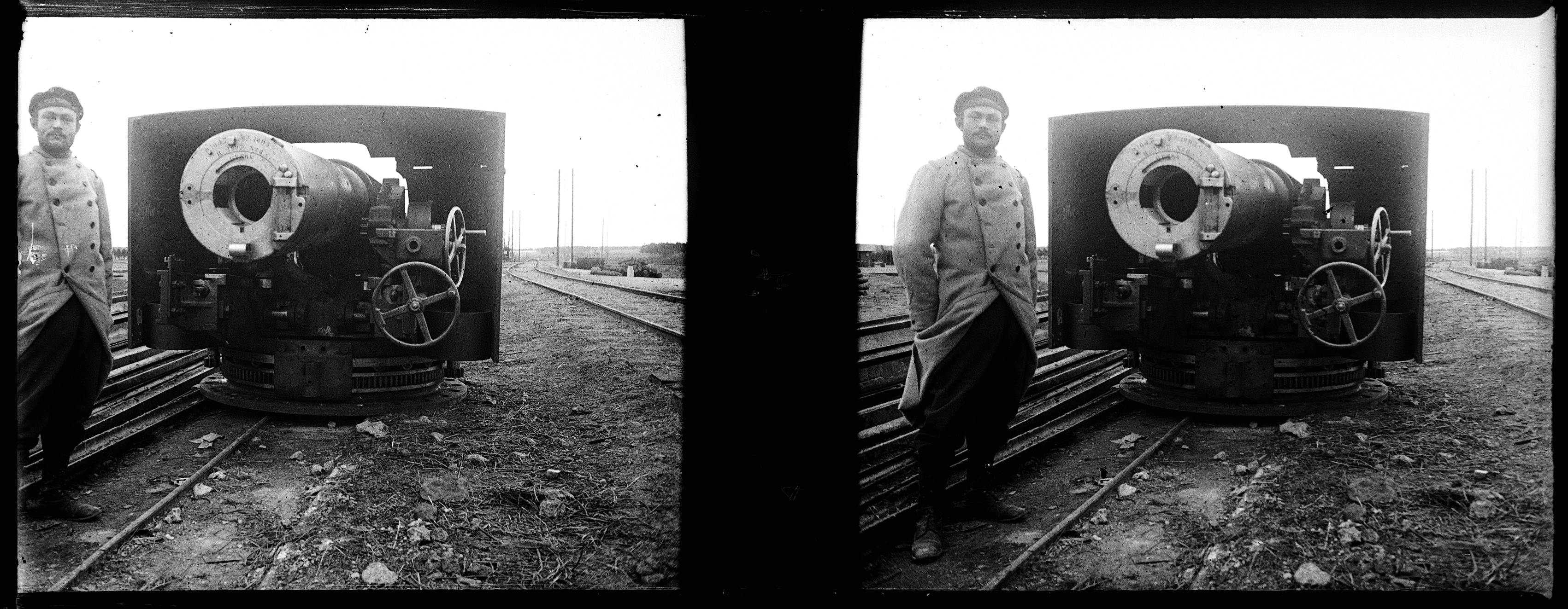 Pièce marine de calibre 164,7 vue de face à la gare de Cuperly dans la Marne. 1916. Guerre 1914-1918. Sur la gauche du canon , un soldat pose.